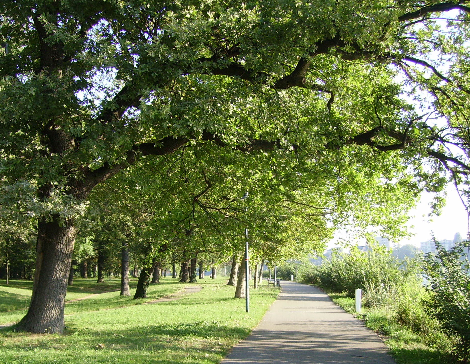 Parkinsel of Ludwigshafen in Rheinland-Pfalz (Germany)